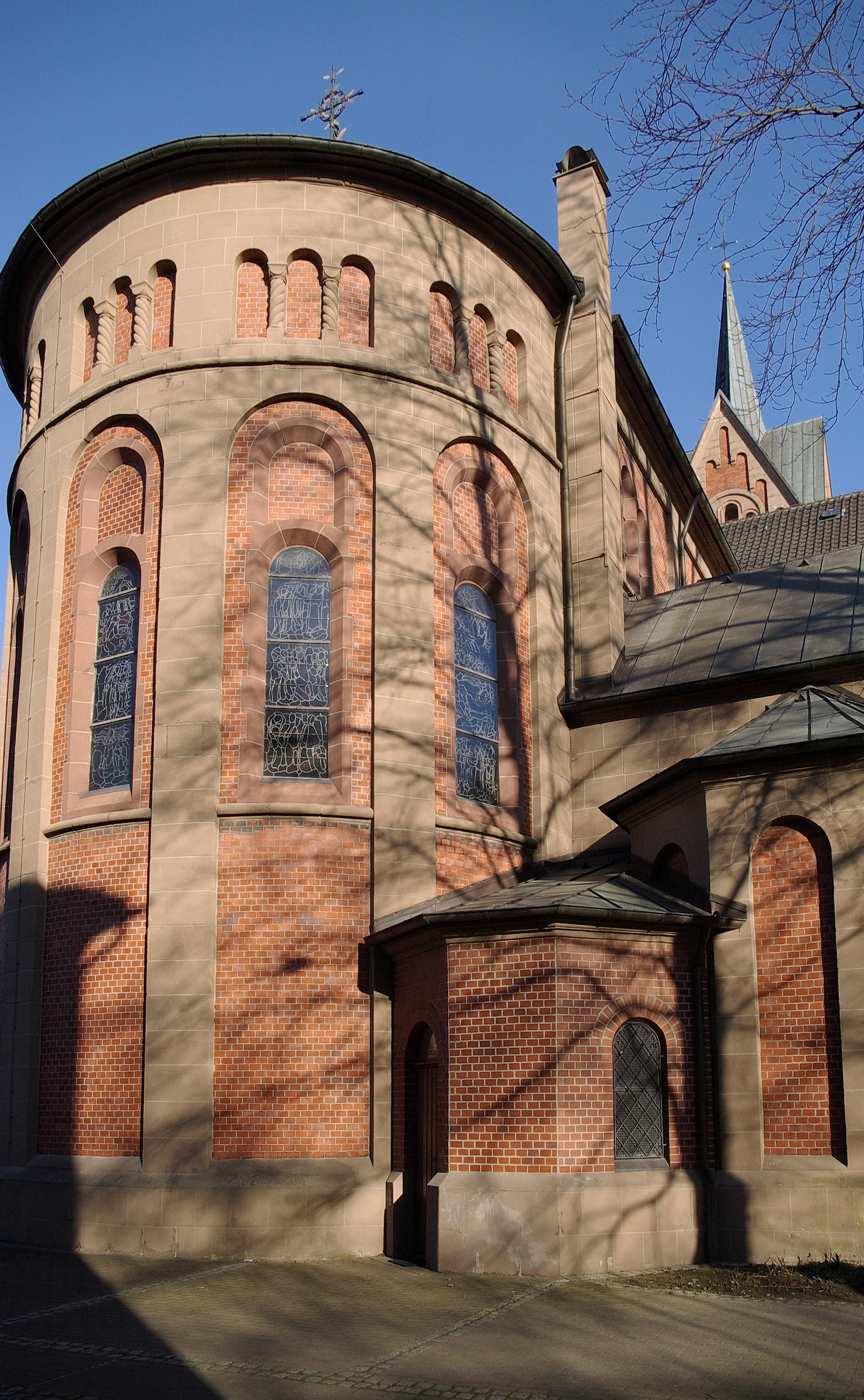 St. Barbara in Dortmund-Dorstfeld